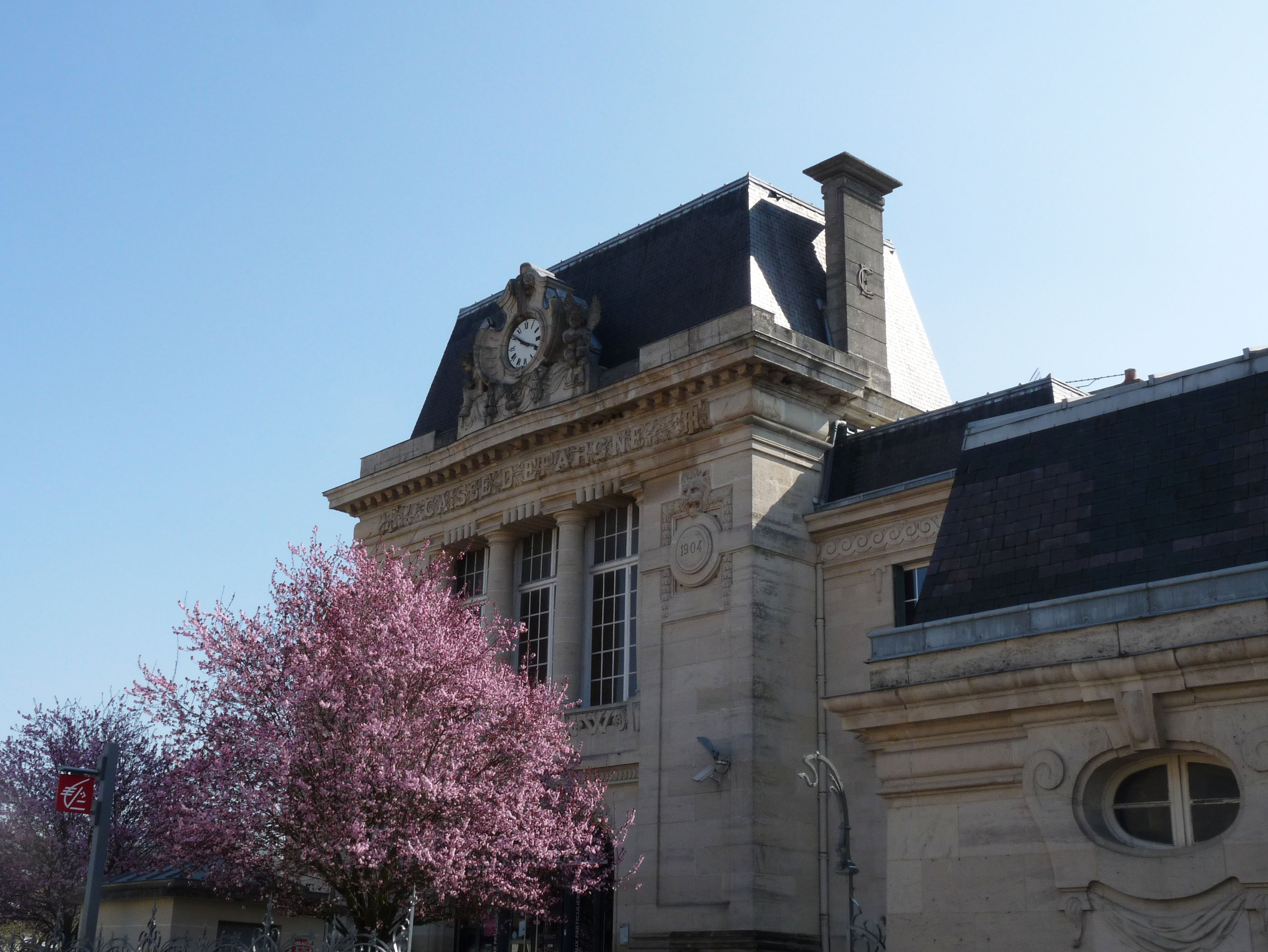 La Caisse d'épargne de Wassy (Haute-Marne), construite en 1904, 31 rue du Général Leclerc